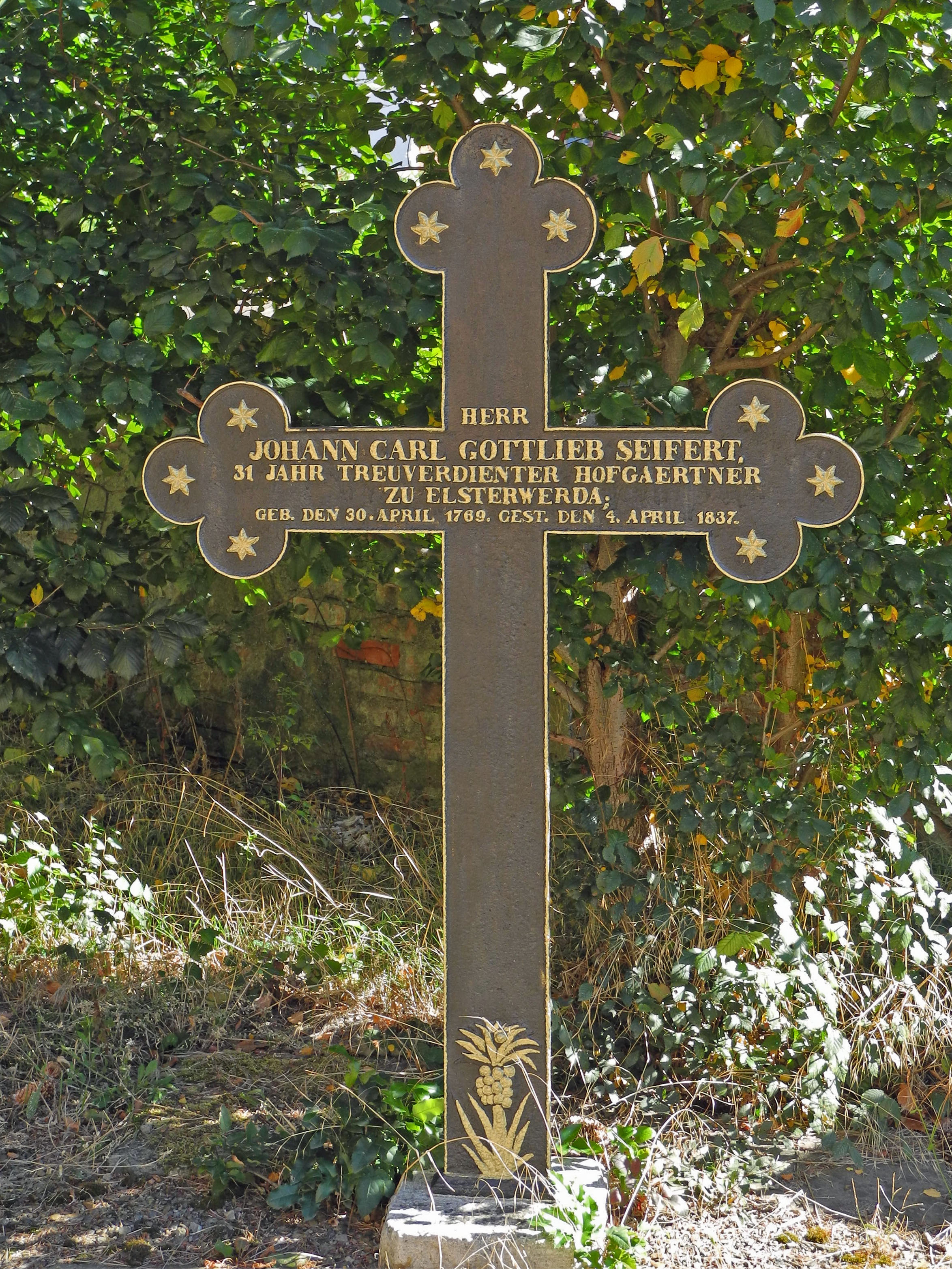 Hofgärtner-Grabkreuz im alten Kirchhof an der Katharinenkirche in Elsterwerda